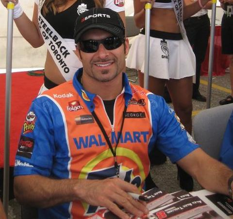 Alex Tagliani in 2007.